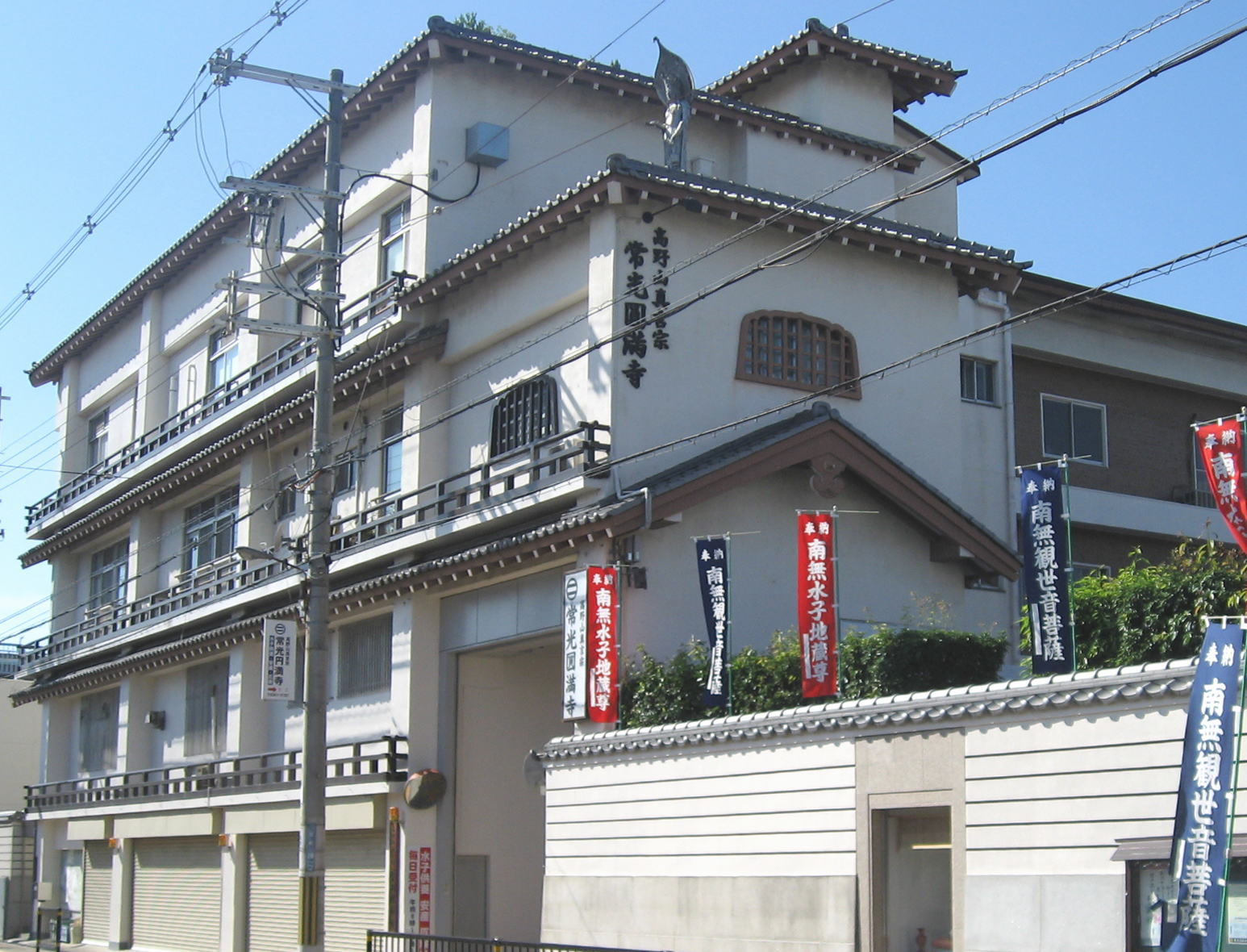 客間や茶室・浴室などがあり、参詣者の方々に利用してもらっている